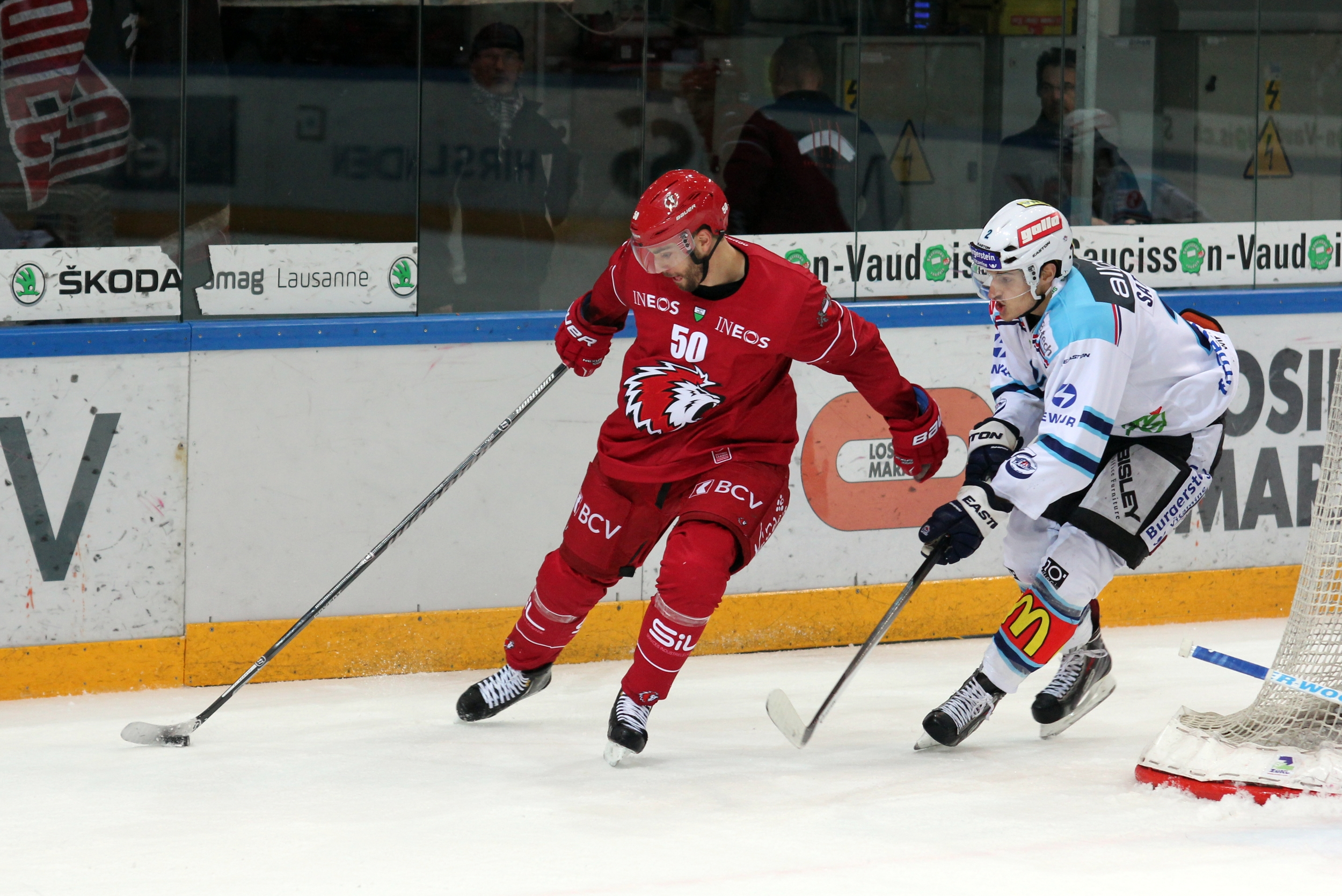 Daniel Bång (L 50), Rajan Sataric (RJ 2).